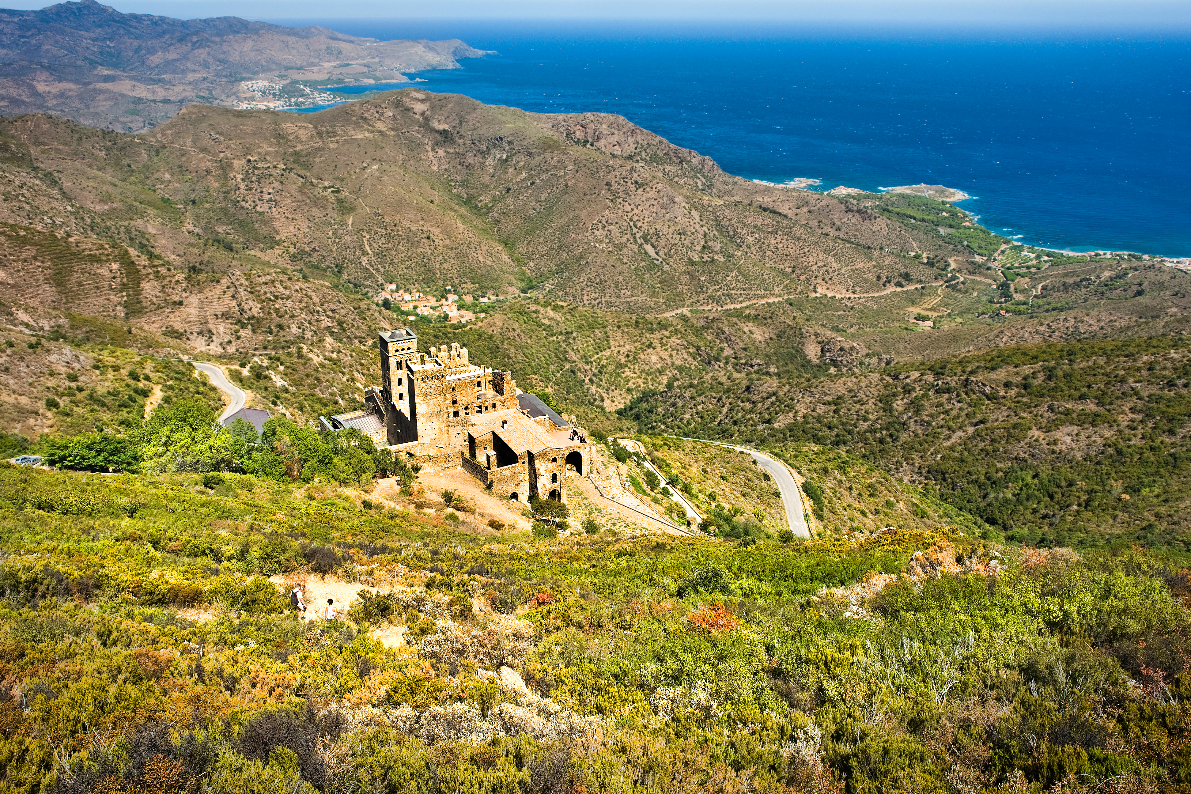 Monestir de Sant Pere de Rodes vist des del castell de Sant Salvador